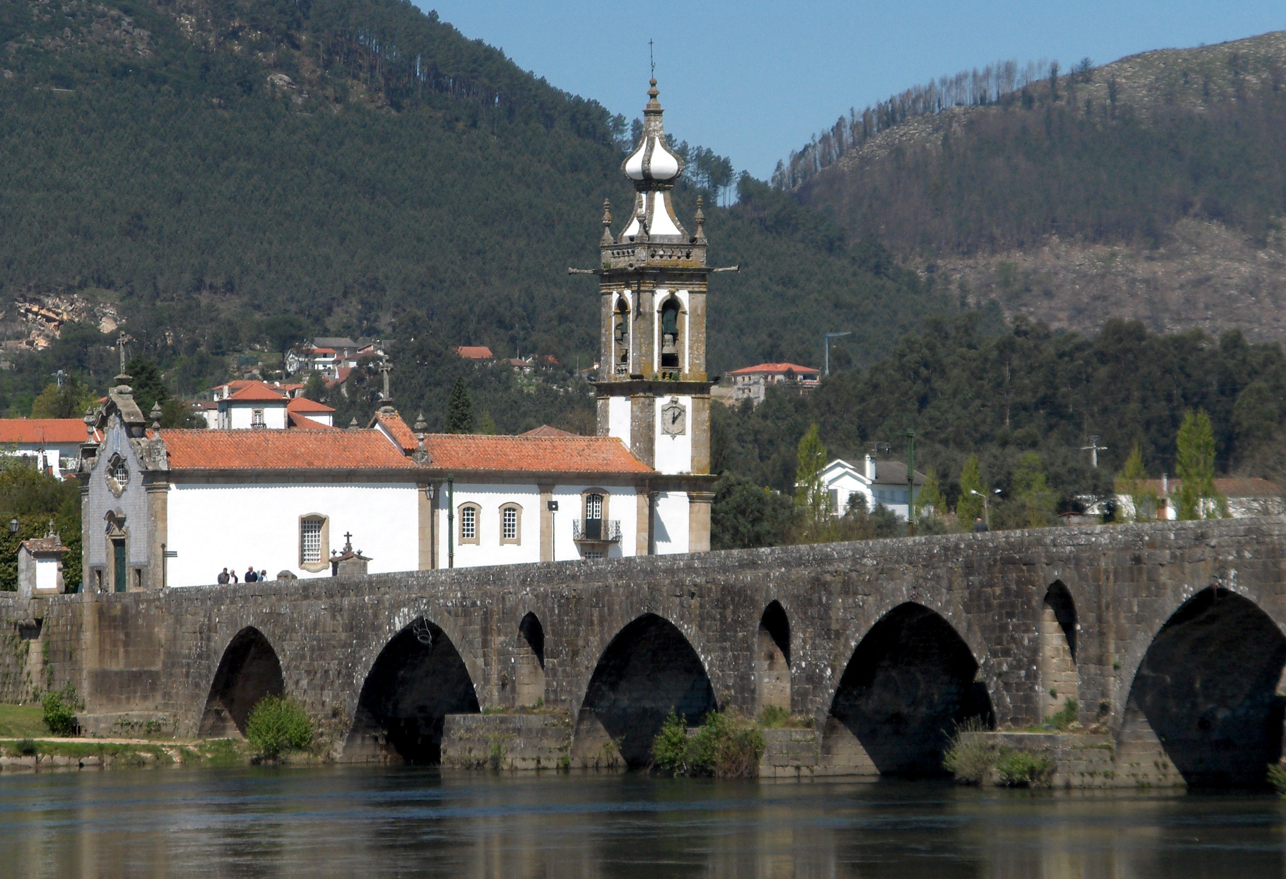 Bréck iwwer d'Lima zu Ponte de Lima